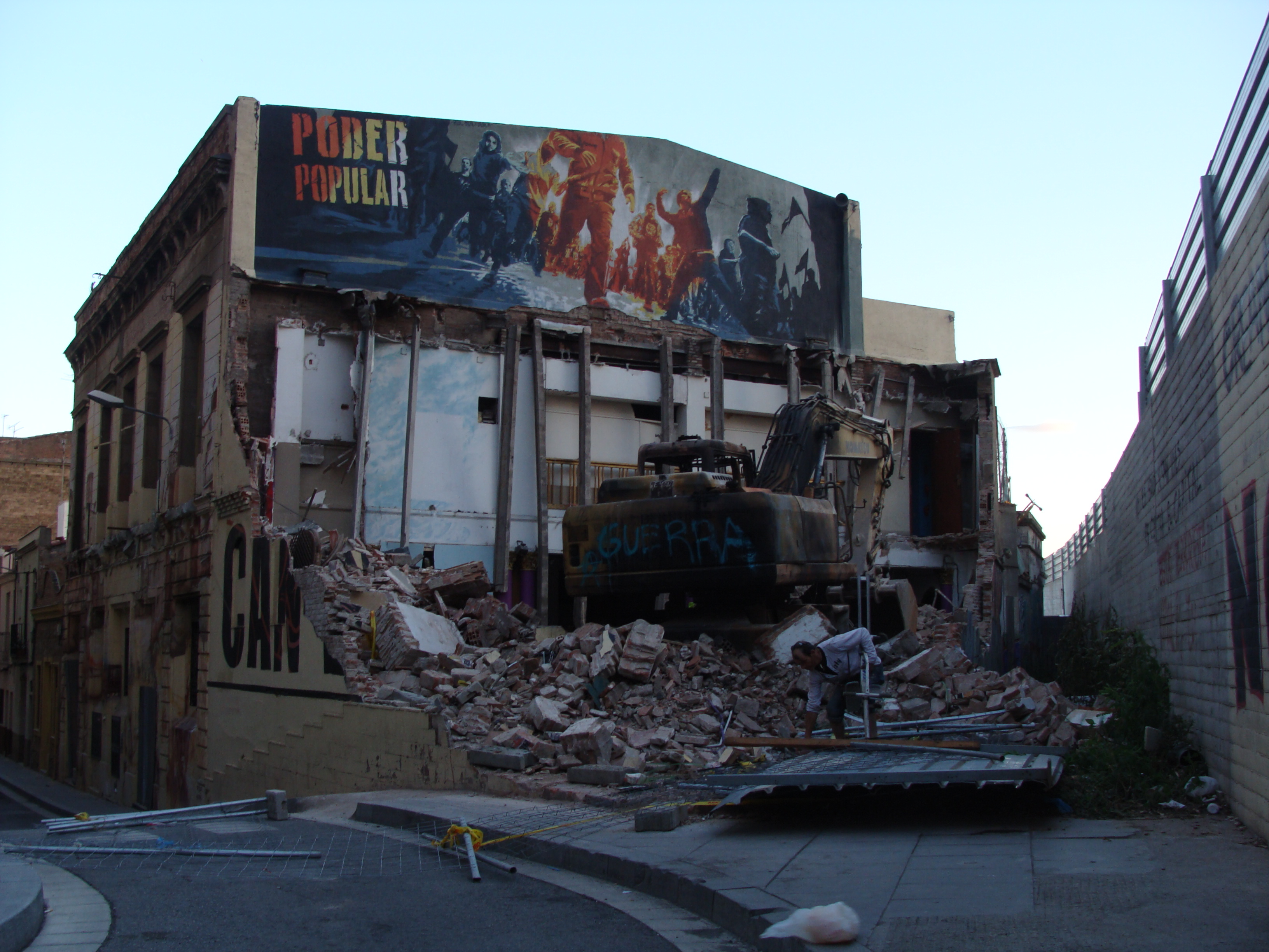 Can Vies enderrocat, 29 de maig de 2014